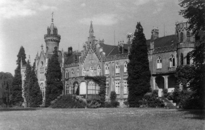 Ehemaliges neogotisches Schloss von Hülseburg im Landkreis Ludwigslust, Mecklenburg-Vorpommern. 1860 durch einen Freiherr von Campe errichtet, 1947 abgebrannt.